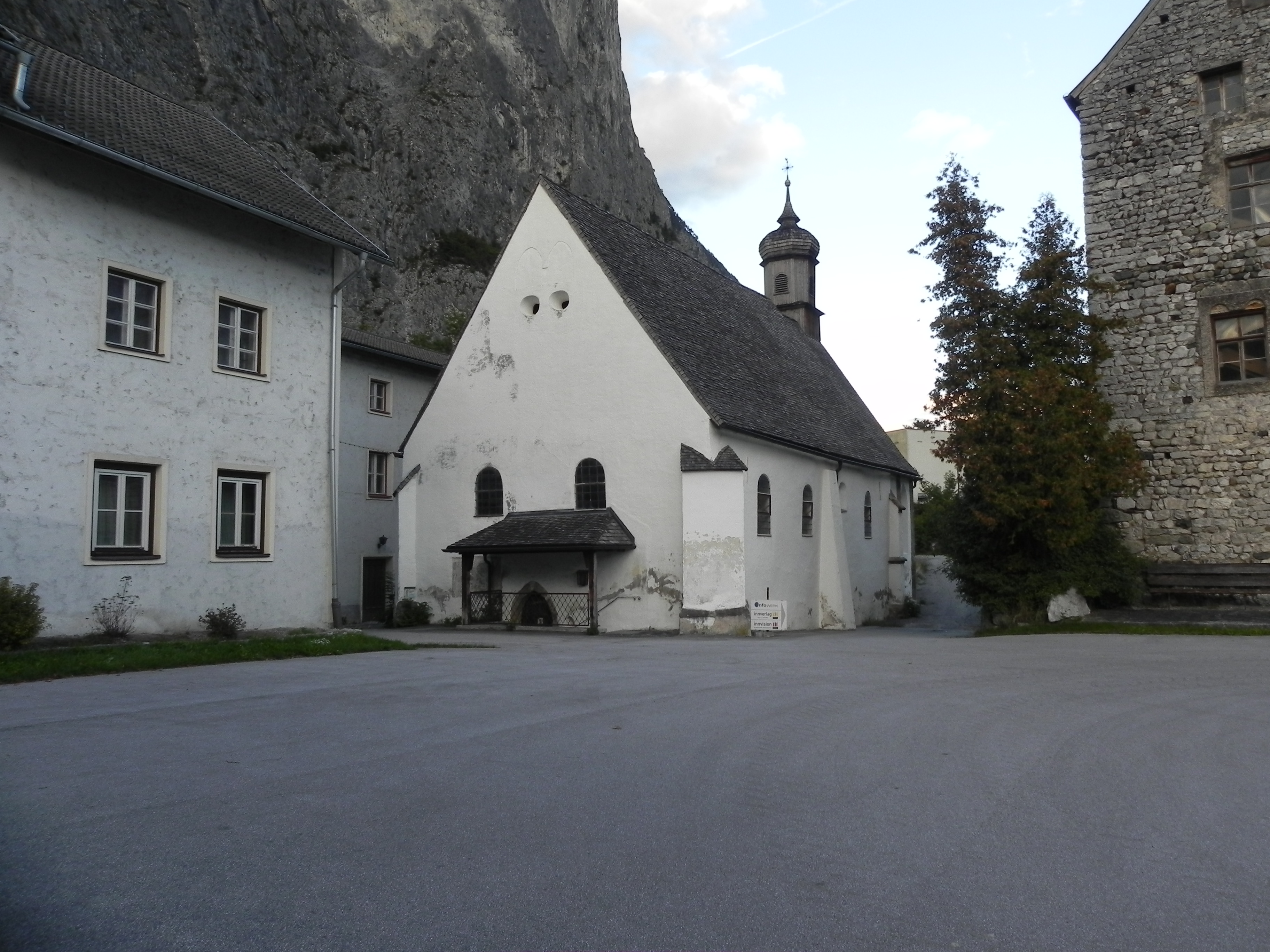 Martinskapelle am Martinsbühel, Zirl/Tirol/Österreich.